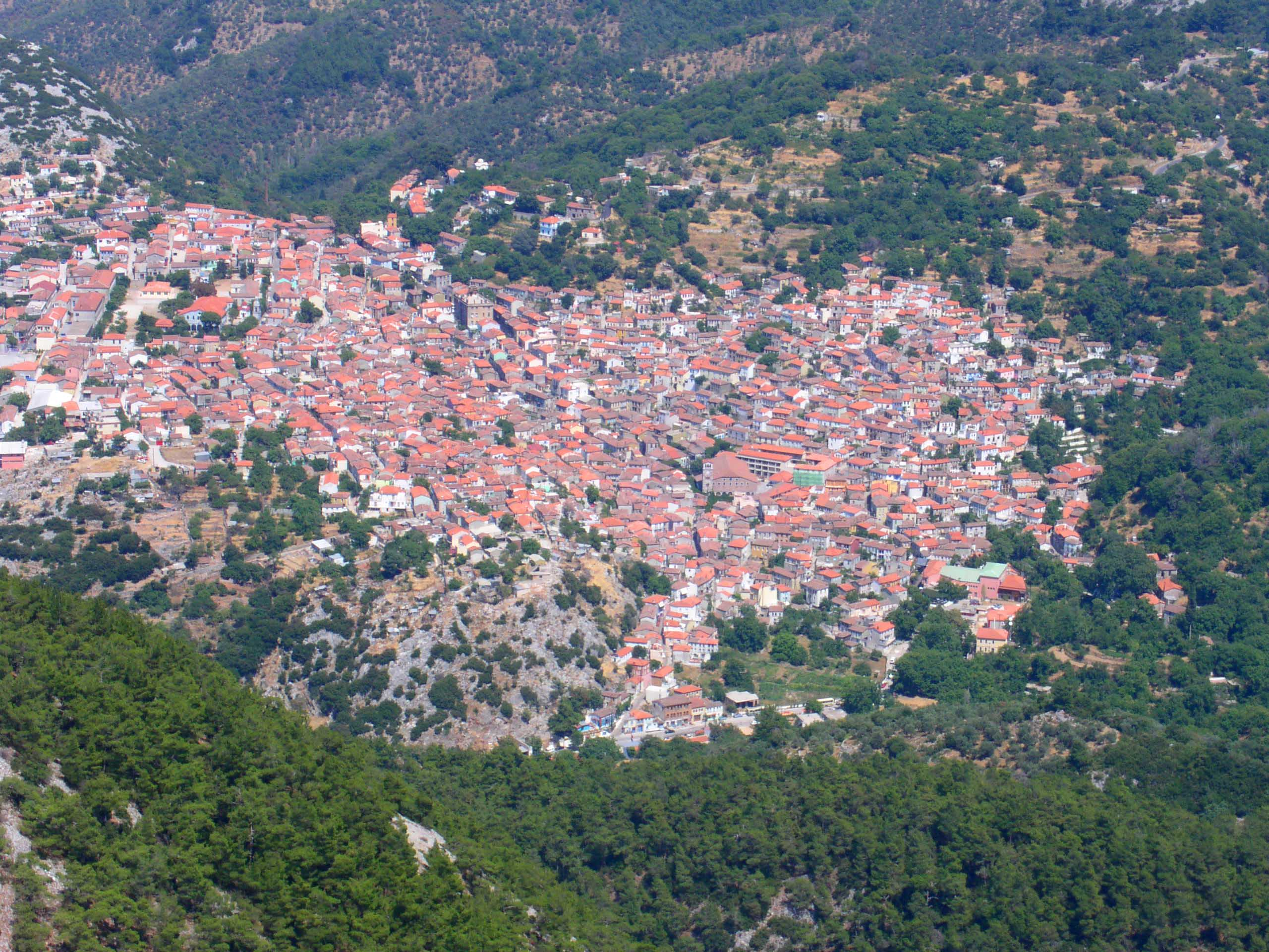 Agiassos vanaf de olympos